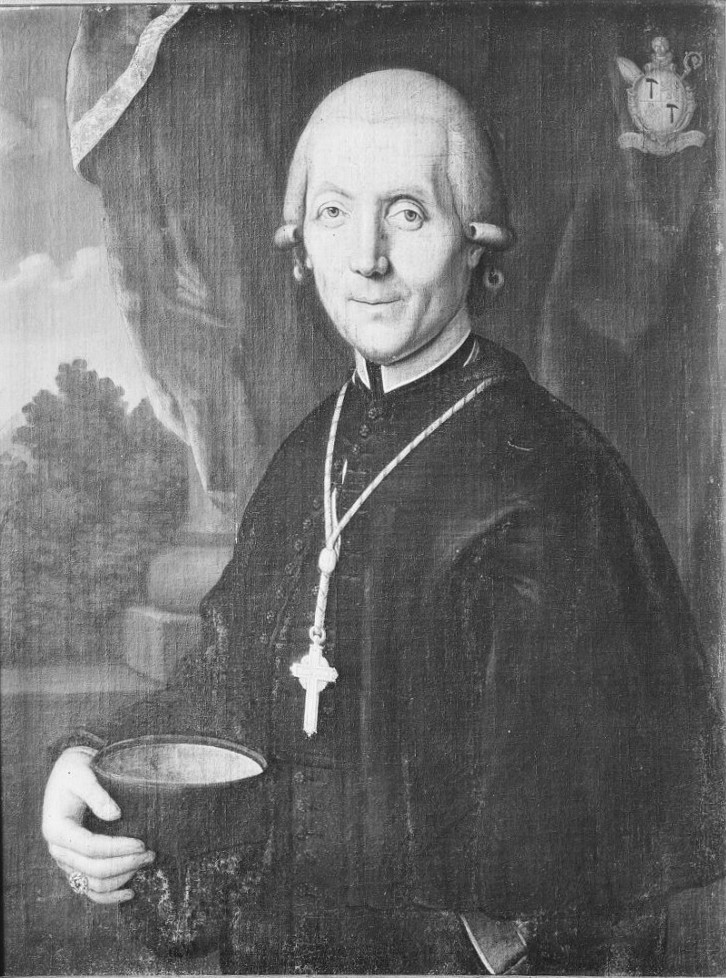 Abdij Rolduc: abtsportret van Petrus Joseph Chaineux, laatste abt van Rolduc (1779-96).